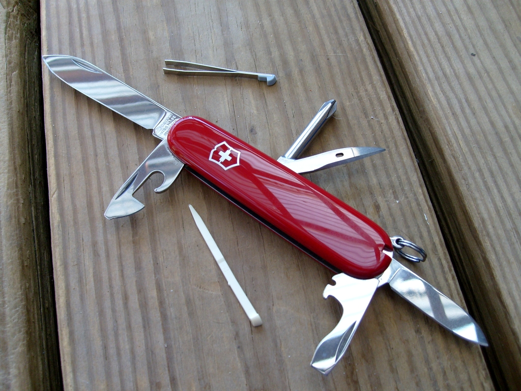 Made in Switzerland